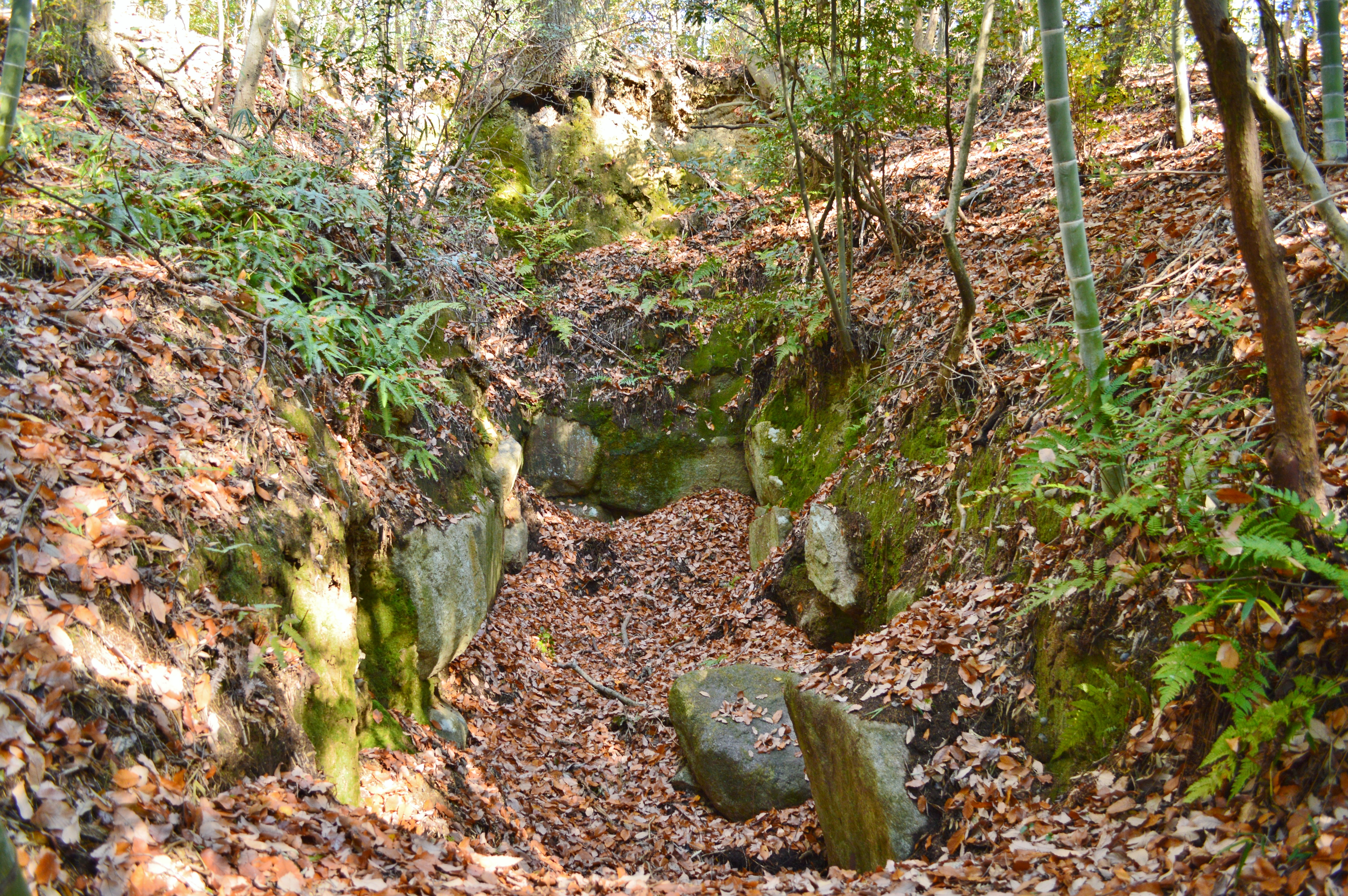 石上大塚古墳 石室